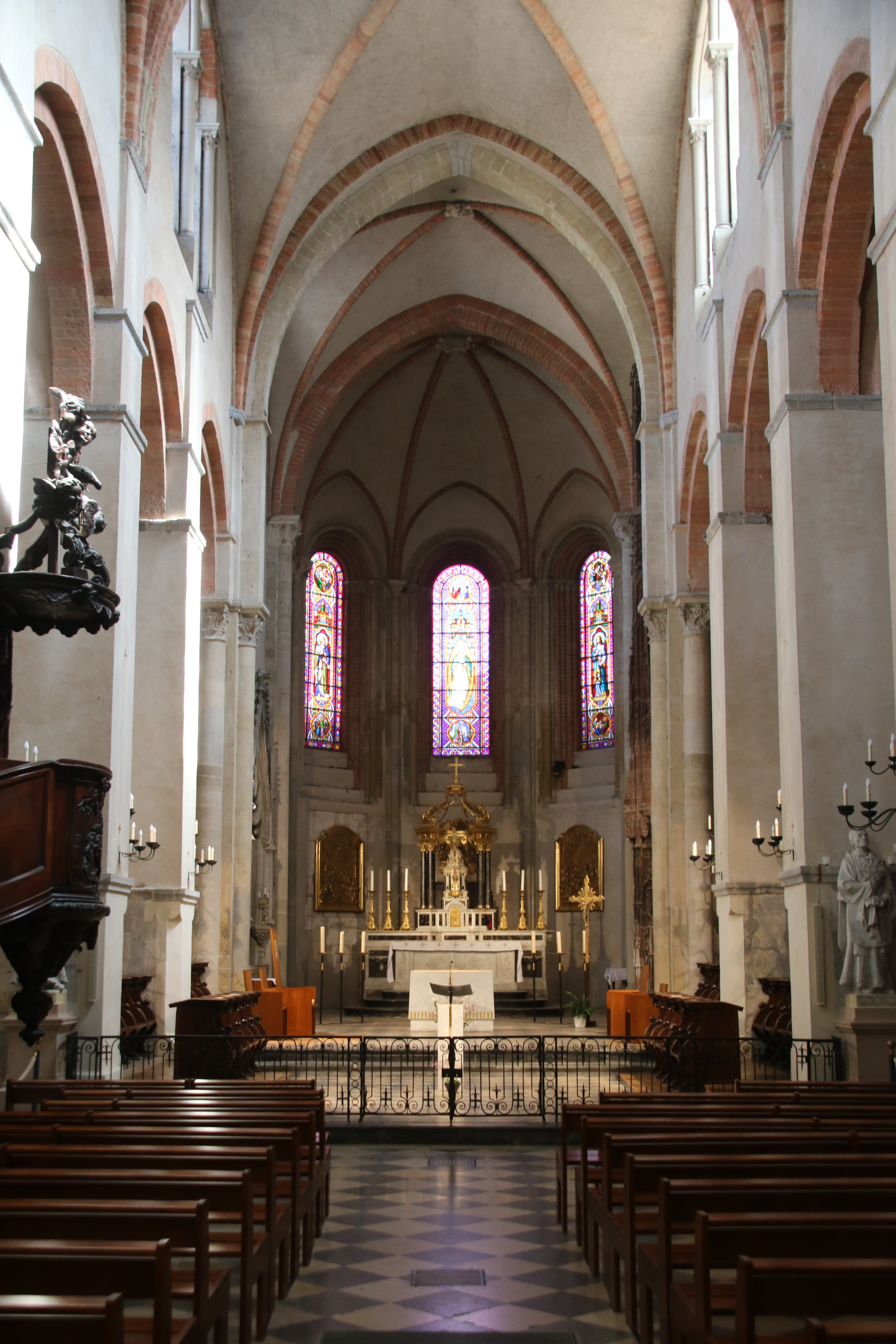 Cathédrale Notre-Dame de Grenoble .